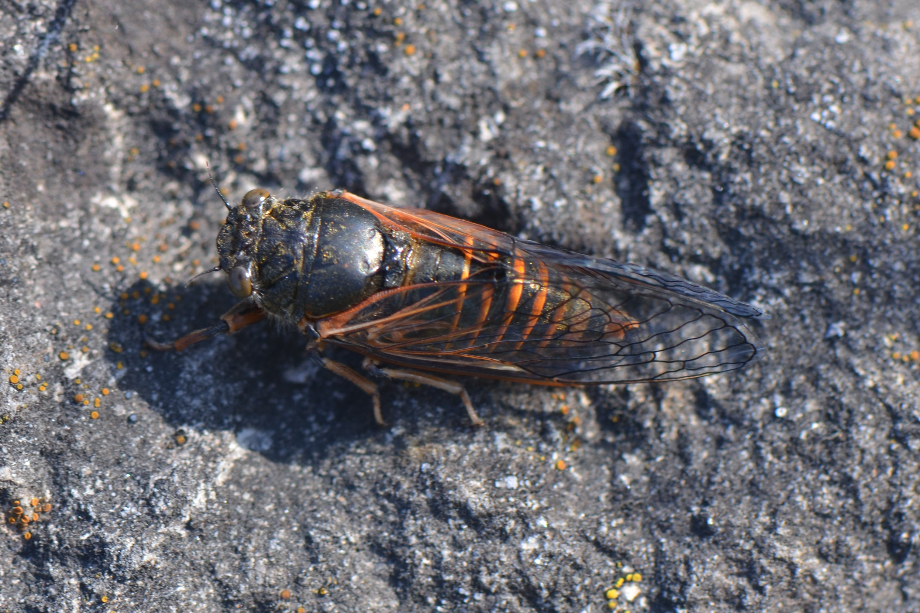 Cicadetta brevipennis (Cigale)